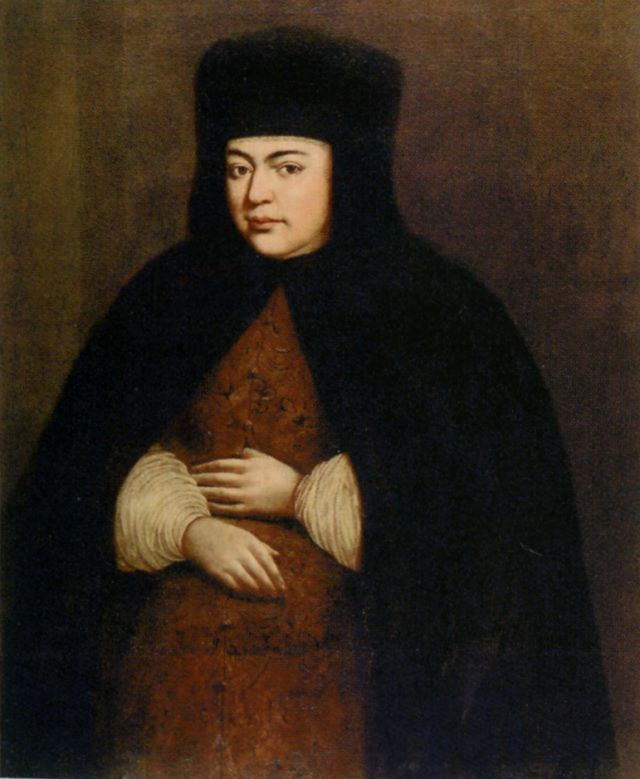 Портрет царицы Натальи Кирилловны. Не ранее 1676 г. ГРМ, Ж-3943. Холст, масло. 126,5 х 95,5 см. Поступил из ГЭ в 1925 (собрание Романовской галереи). Атрибуция И.И.Хилимончик (Хилимончик 2004). Конец января – начало февраля 1694 (?) Экспонирование Михайловский замок, Зал 209. Помещение лейб-гвардии Изображена во вдовьем покрывале, которое могло появиться лишь после смерти царя Алексея Михайловича в 1676 году. Однако существует обоснованное предположение, что портрет царицы мог быть исполнен живописцем Оружейной палаты Михаилом Чоглоковым сразу после ее смерти, последовавшей 25 января 1694, и закончен 9 февраля. Автор версии ссылается на обнаруженную И. Е. Забелиным челобитную художника, в которой сказано: «...писал я образ во успении государыни благоверной царицы и великой княгини Натальи Кирилловны на полотне персону живописным письмом...». Из челобитной, опубликованной исследователем раннего русского портрета Е. С. Овчинниковой, также следовало, что «Чоглоков работал над портретом Натальи Кирилловны у себя дома 9 дней, с 25 января по 6 февраля 1694 года» (Овчинникова. С. 123). В последней трети XVII века живописный портрет «во успении» получает широкое распространение. Как писала автор атрибуции, «...в отличие от надгробного изображения, помещенного в среду храма и исполненного в традициях иконописного образа, живописный портрет „во успении", написанный на холсте, в новой технике маслом, должен был находиться в светских хоромах для памяти потомков. Главным в нем была передача сходства, жизненного подобия, именно поэтому портретируемые на персонах „во успении" пишутся живыми» (Эпоха парсуны. С. 128, 249). Авторская живопись на лице, платье и руках сохранилась достаточно хорошо, наличие в ней авторских правок подтверждает оригинальность портрета.